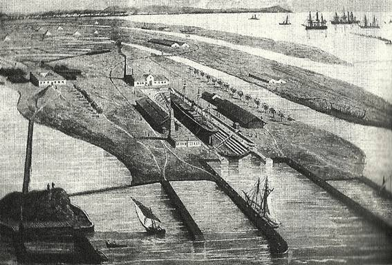 Dibujo de los diques de carena de Trocadero